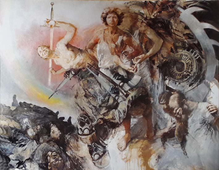 Katharina von Alexandrien, 1984, 160 x 203 cm, Öl auf Leinwand, Bez. u.r. “Timner 84”